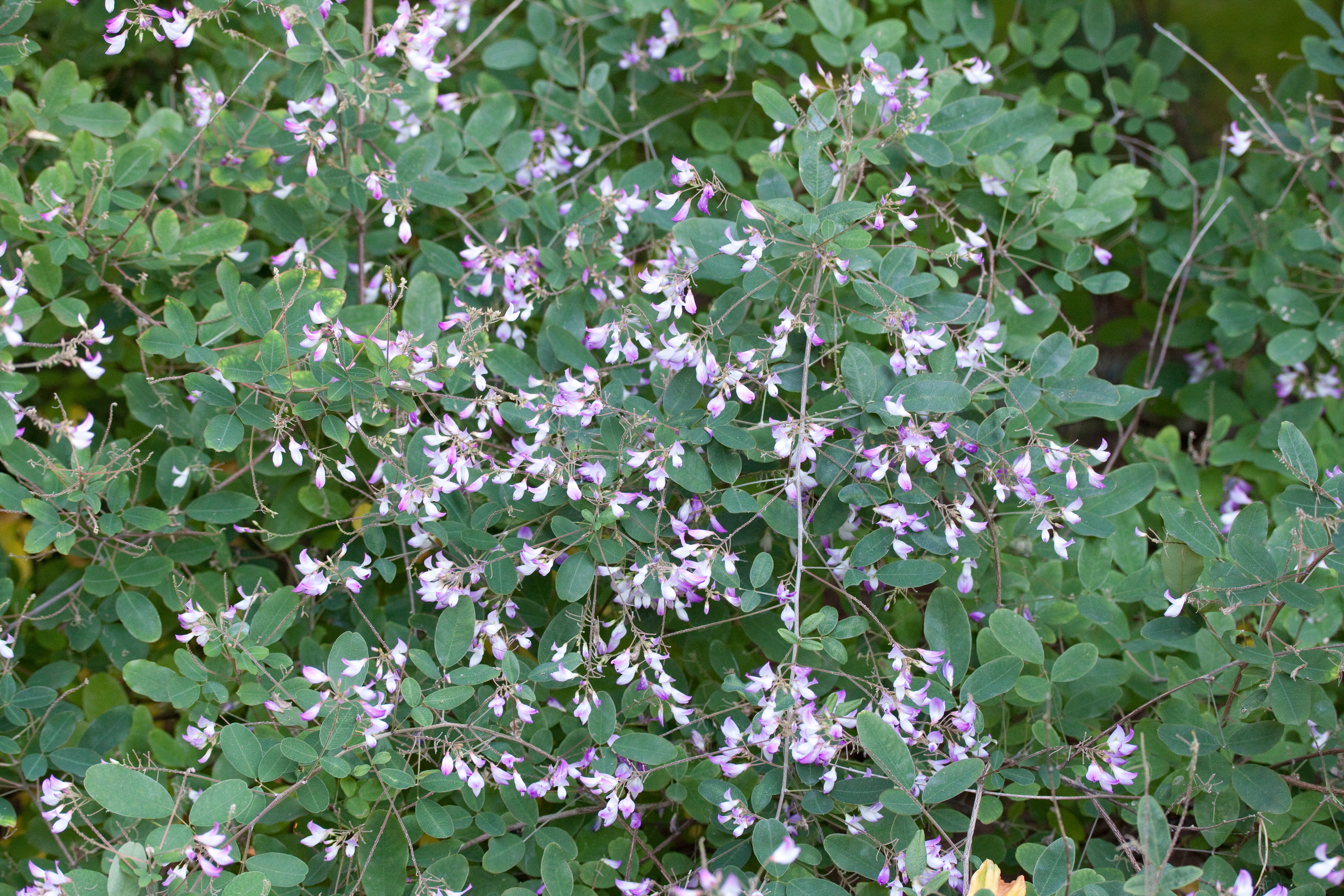 Floraison de Campylotropis macrocarpa - Jardin des Plantes - Paris